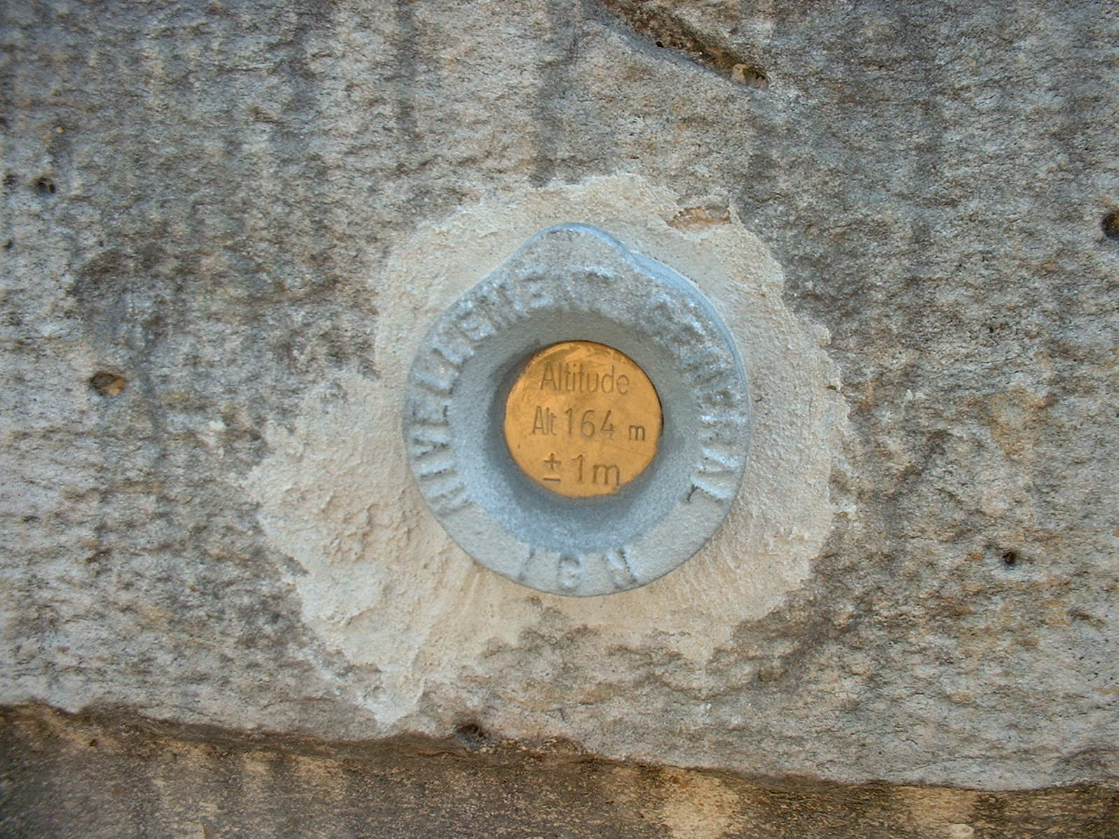 Repère NGF IGN